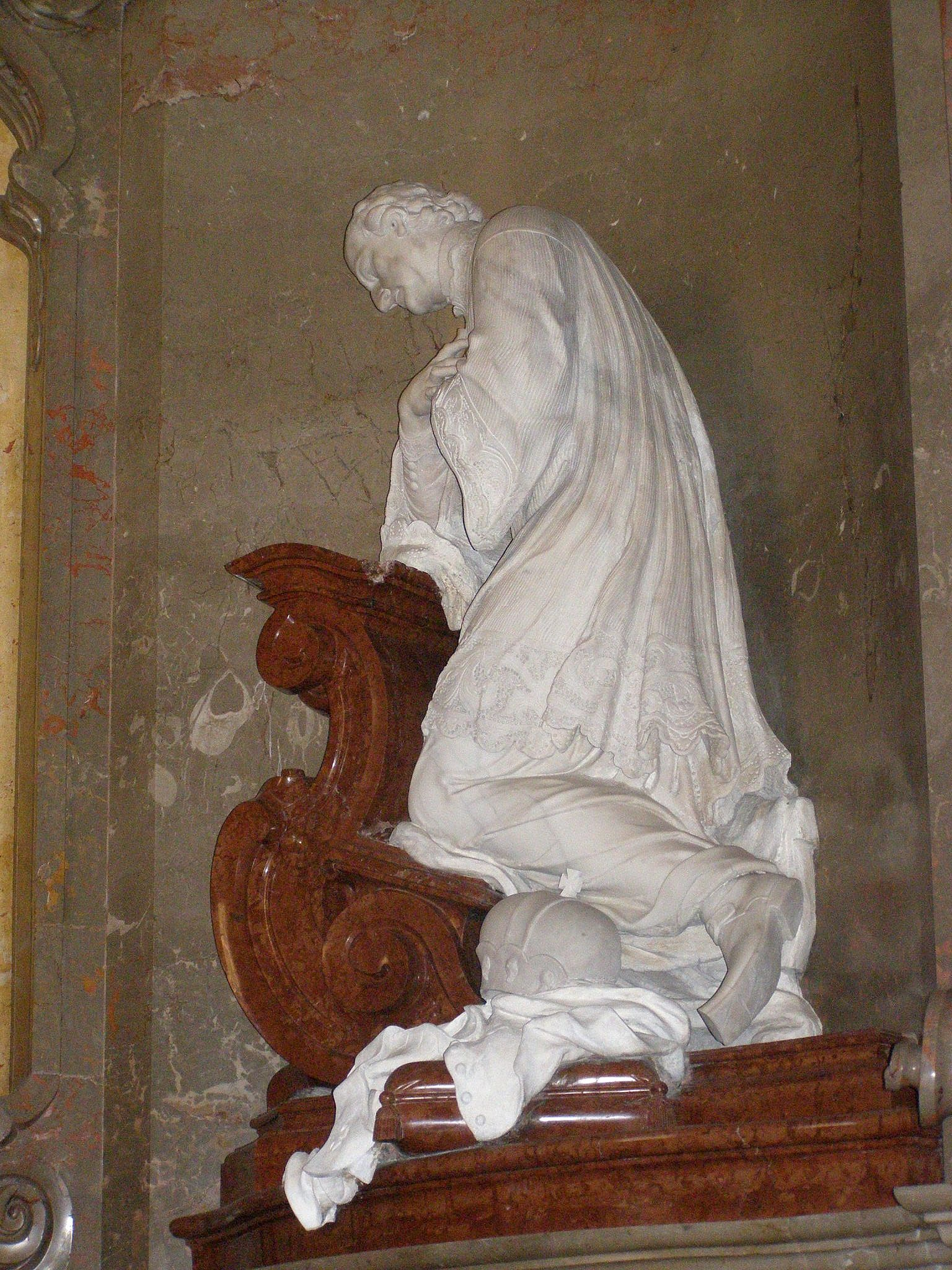 Georg Rafael Donner, Adorujúci arcibiskup Imrich Esterházy, 30-te roky 18. stor., mramor, Katedrála svätého Martina, Bratislava (kaplnka svätého Jána Almužníka)